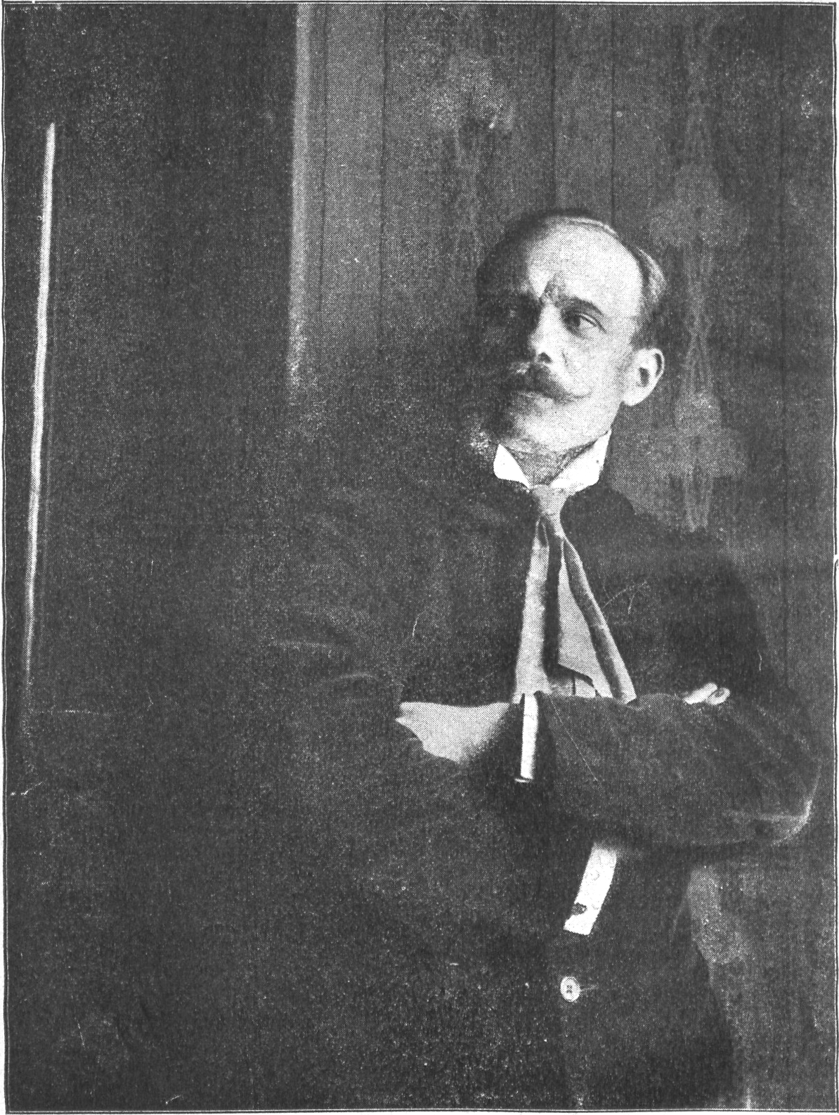 Ilustracja z książki „Zdroje Raduni“ - portret Aleksandra Majkowskiego